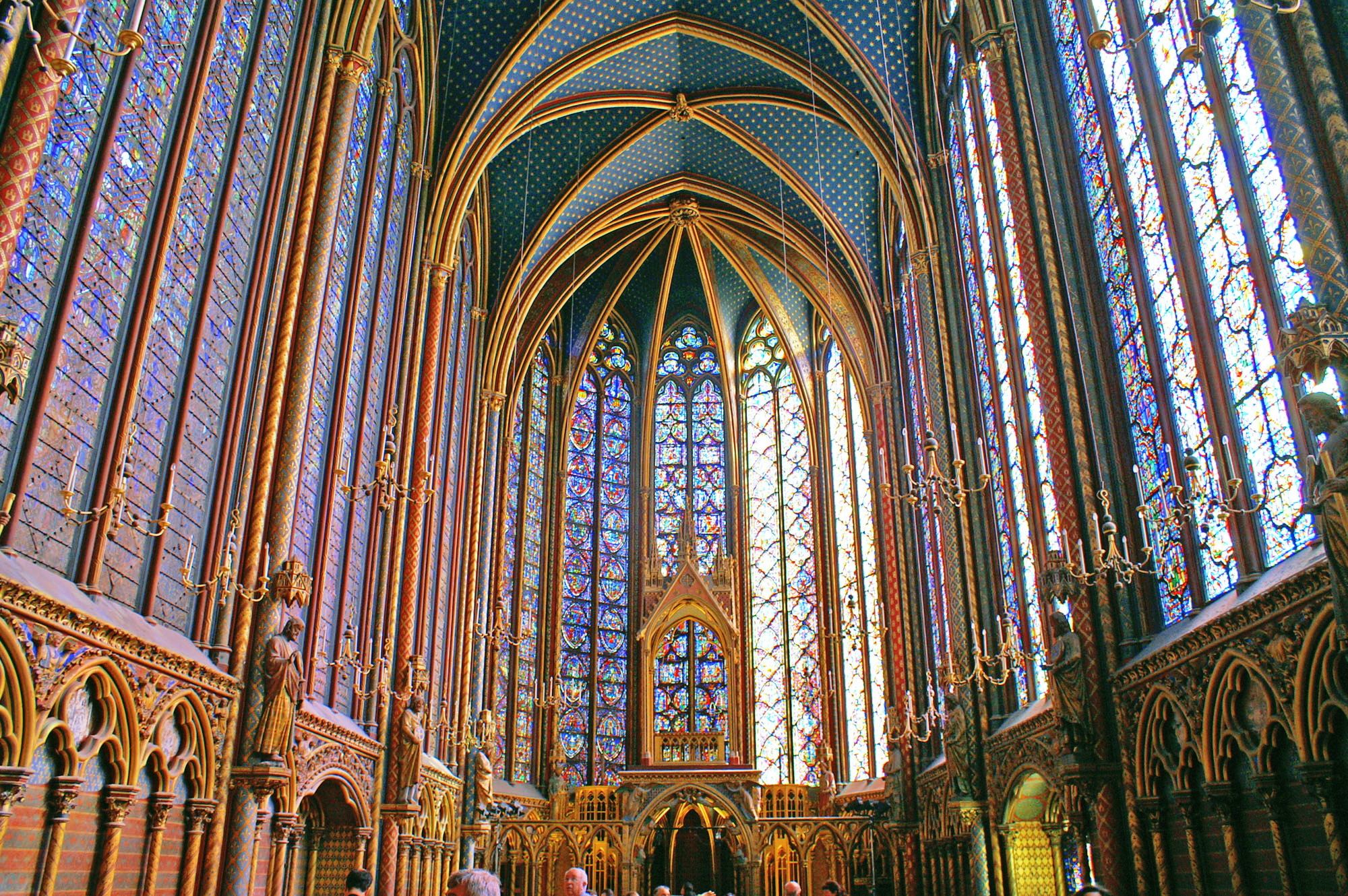 Sainte Chapelle - Upper Chapel, Paris, France